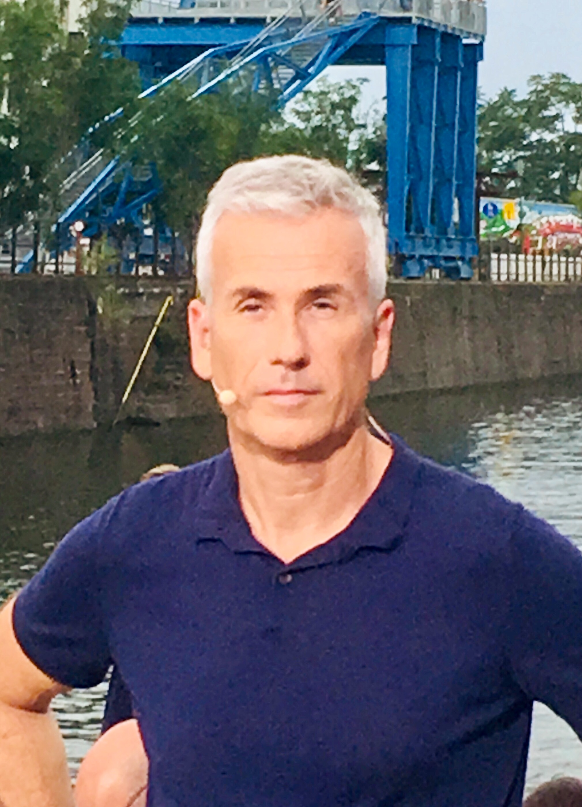 Andreas Hieke bei Hessenschau on Tour an der Hafentreppe in Offenbach am Main